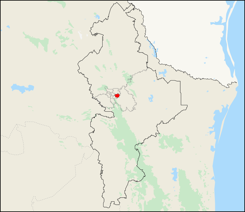 Mapa del distrito electoral federal 8 ubicado en Nuevo León